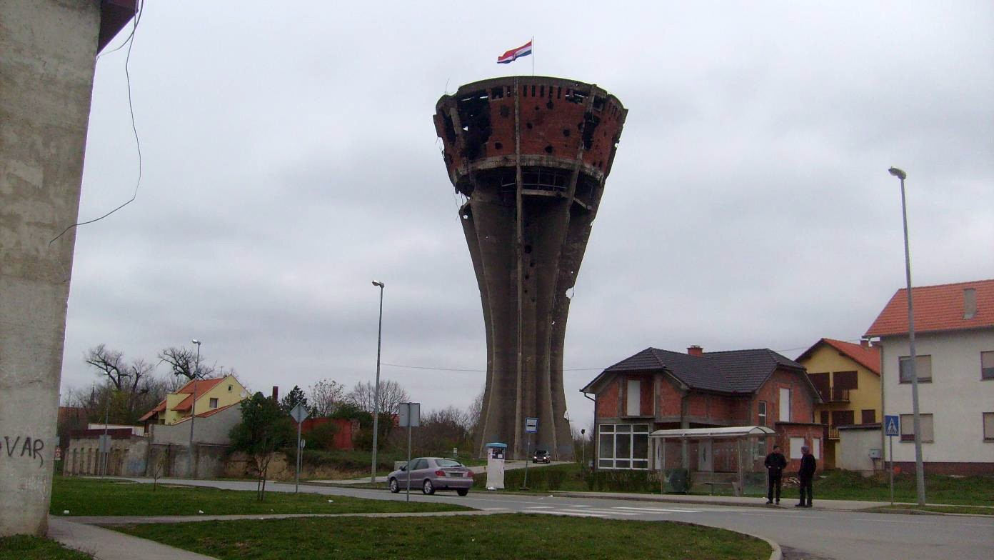 23.03.2008. _ Vukovar